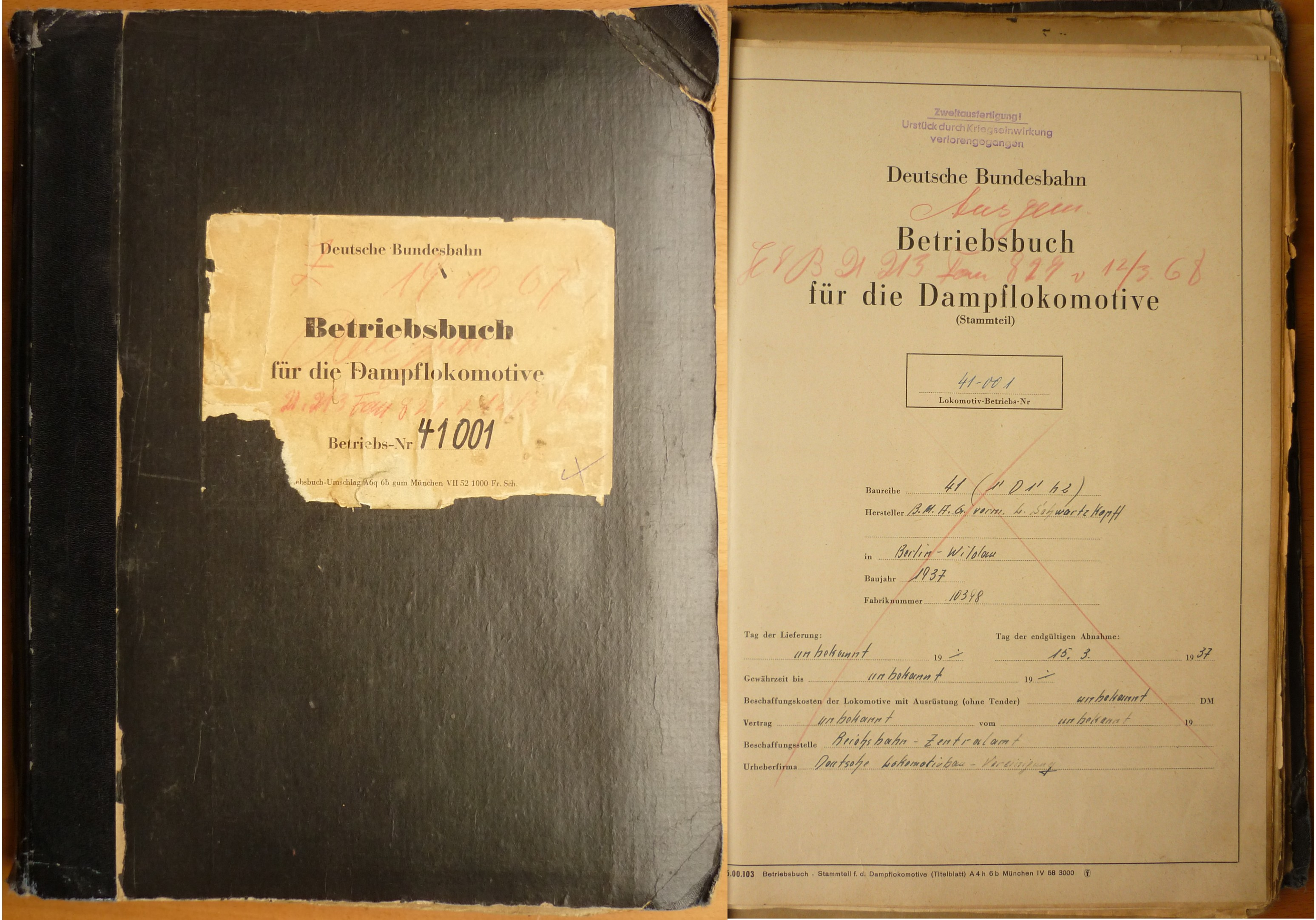 Hersteller der Lok, Beheimatungen, Reperaturen, Ausmusterung